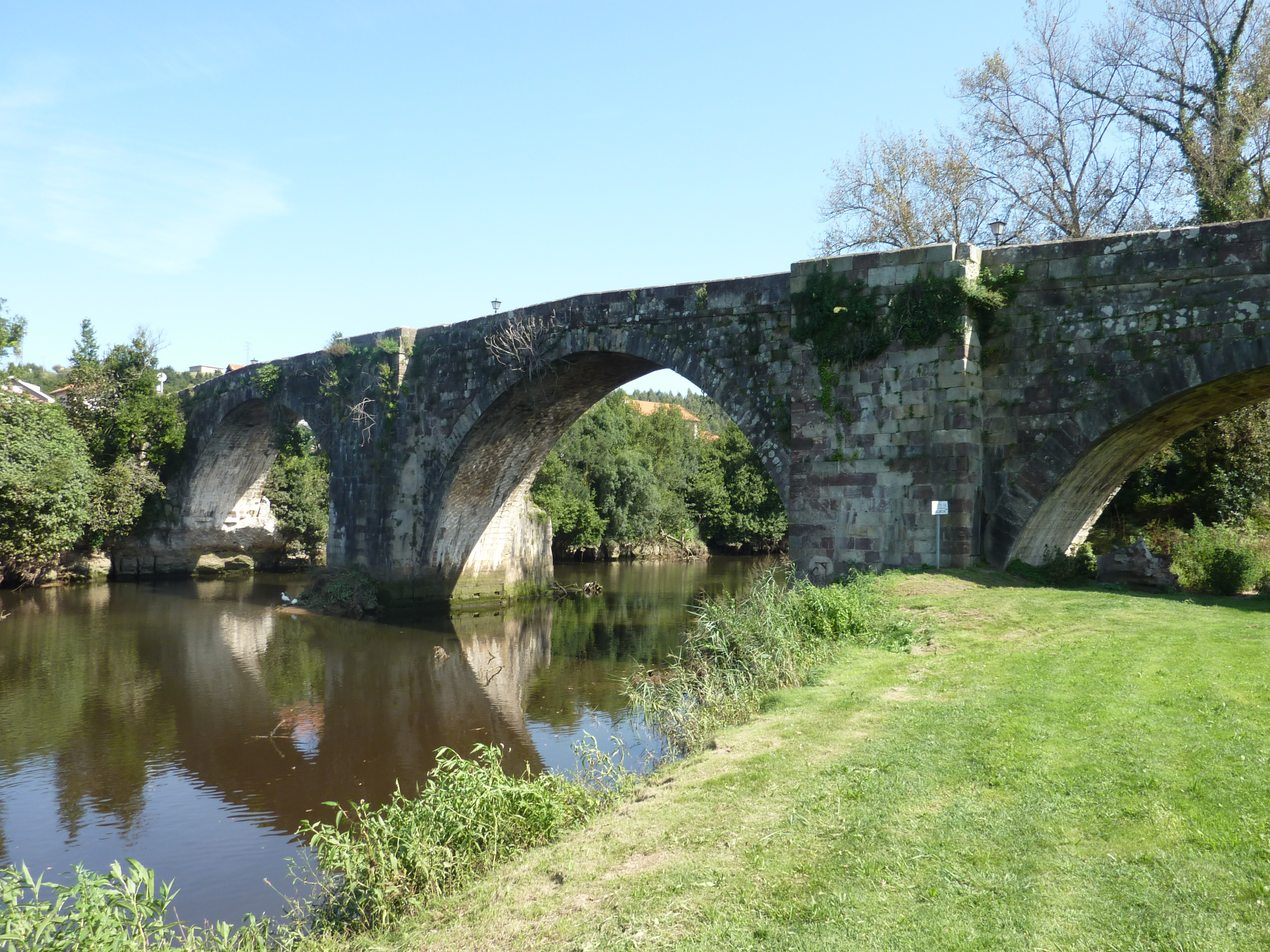 Puente.